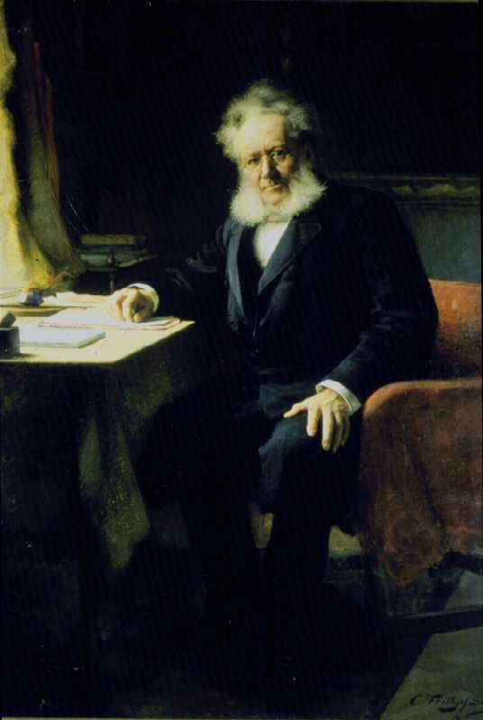 Portrett av Henrik Ibsen malt i München